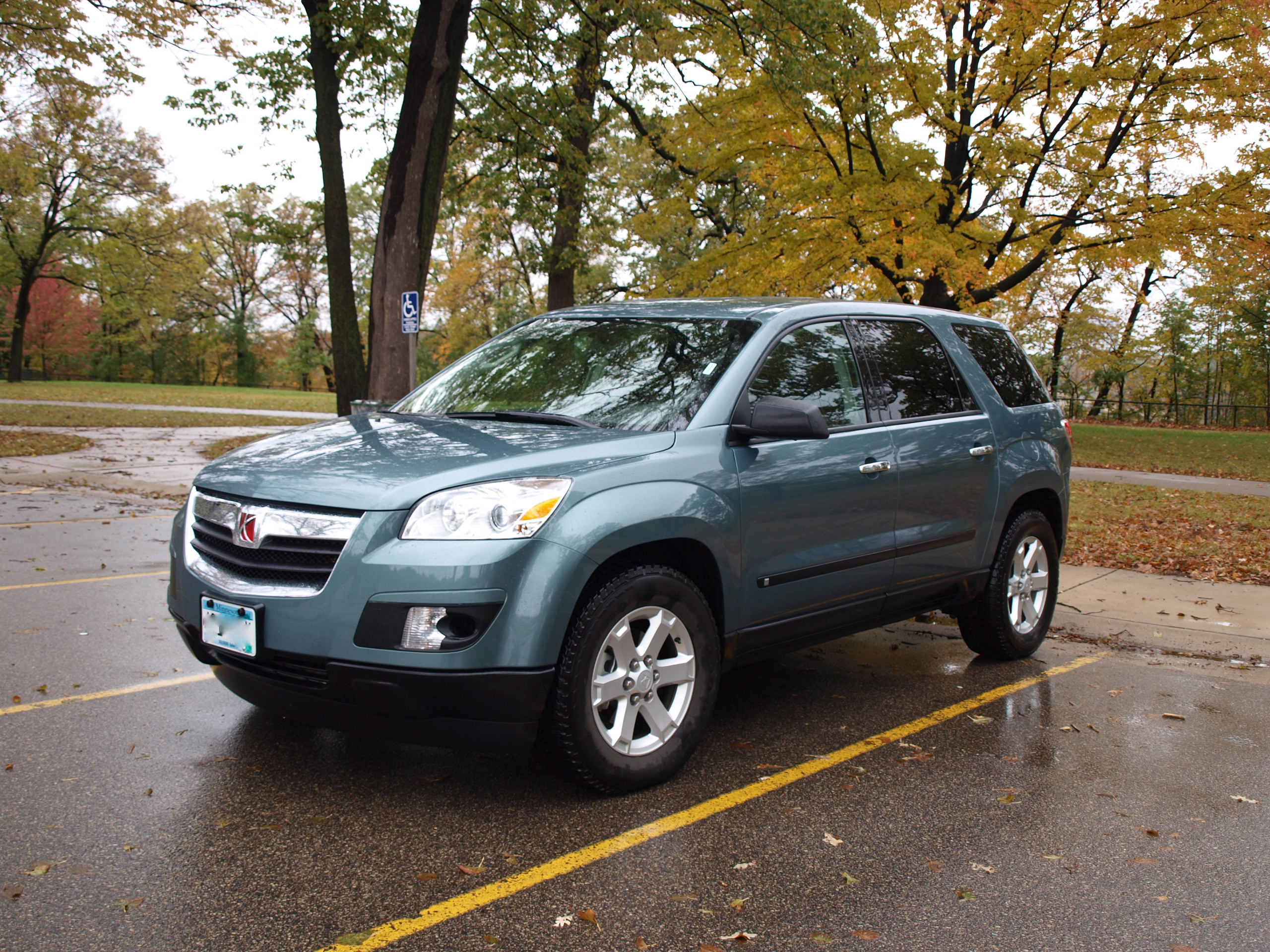 Saturn Outlook 2009.